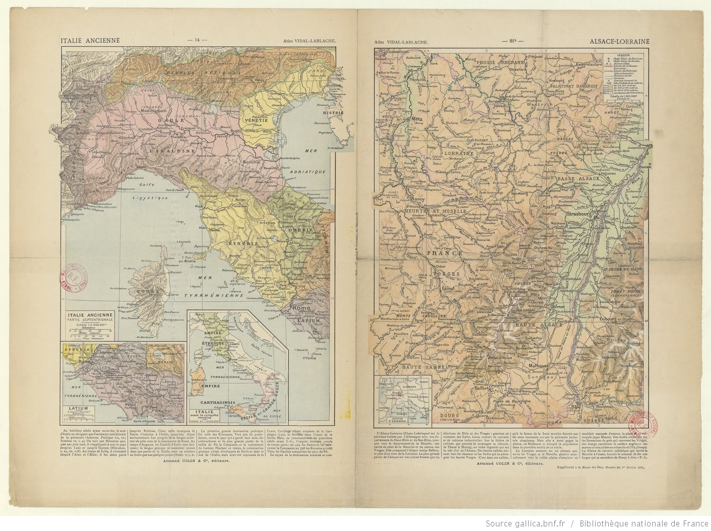 Titre : Autriche-Hongrie ; Italie ancienne ; Alsace-Lorraine : Atlas Vidal-Lablache Auteur : Vidal de La Blache, Paul (1845-1918). Cartographe Éditeur : A. Colin (Paris) Date d'édition : 1891 Sujet : Autriche-Hongrie -- Divisions politiques et administratives Sujet : Autriche-Hongrie -- Religions Sujet : Autriche-Hongrie -- Ethnographie Sujet : Autriche-Hongrie -- Agriculture Sujet : Autriche-Hongrie -- Industrie Sujet : Vienne -- Environs Sujet : Portes de Fer, Défilé des Sujet : Italie antique -- Nord -- Histoire -- Antiquité Sujet : Alsace-Lorraine Type : carte,image fixe Langue : Français Format : 1 flle : en coul. ; 38 x 53 cm Format : image/jpeg Droits : domaine public Identifiant : ark:/12148/btv1b530197220 Source : Bibliothèque nationale de France, département Cartes et plans, GE D-9346 Relation : Couverture : Autriche Couverture : Hongrie Couverture : Italie Couverture : France – Alsace Description : Échelle(s) : [Échelles diverses] Provenance : bnf.fr Date de mise en ligne : 26/06/2012